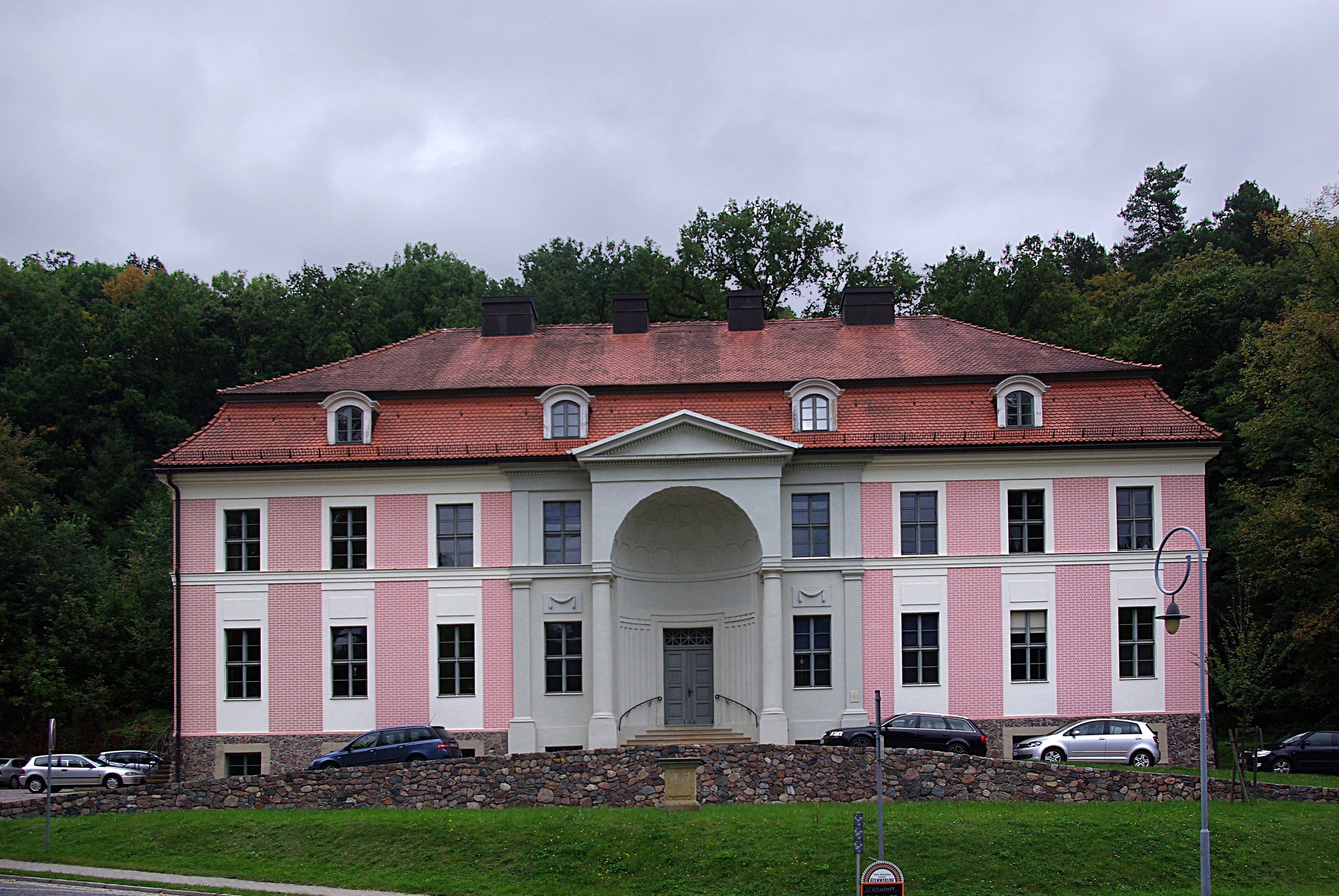 Bad Freienwalde in Brandenburg. Das Landhaus wurde 1790 fertiggestellt. Es ist Teil der Anlage Gesundbrunnen in Bad Freienwalde.